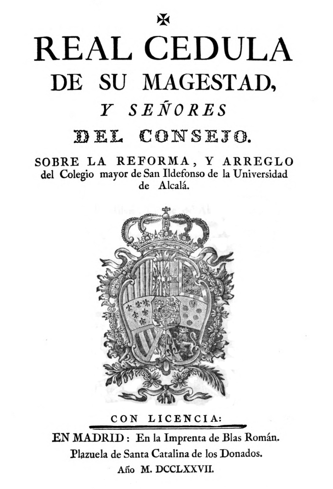 Portada de la "Real Cédula de su Majestad y señores del Consejo, sobre la reforma y arreglo del Colegio mayor de San Ildefonso de la Universidad de Alcalá". Publicada en Madrid, en 1777.